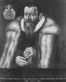 Prof. Georg Hitzler, Gemälde in der Tübinger Professorengalerie